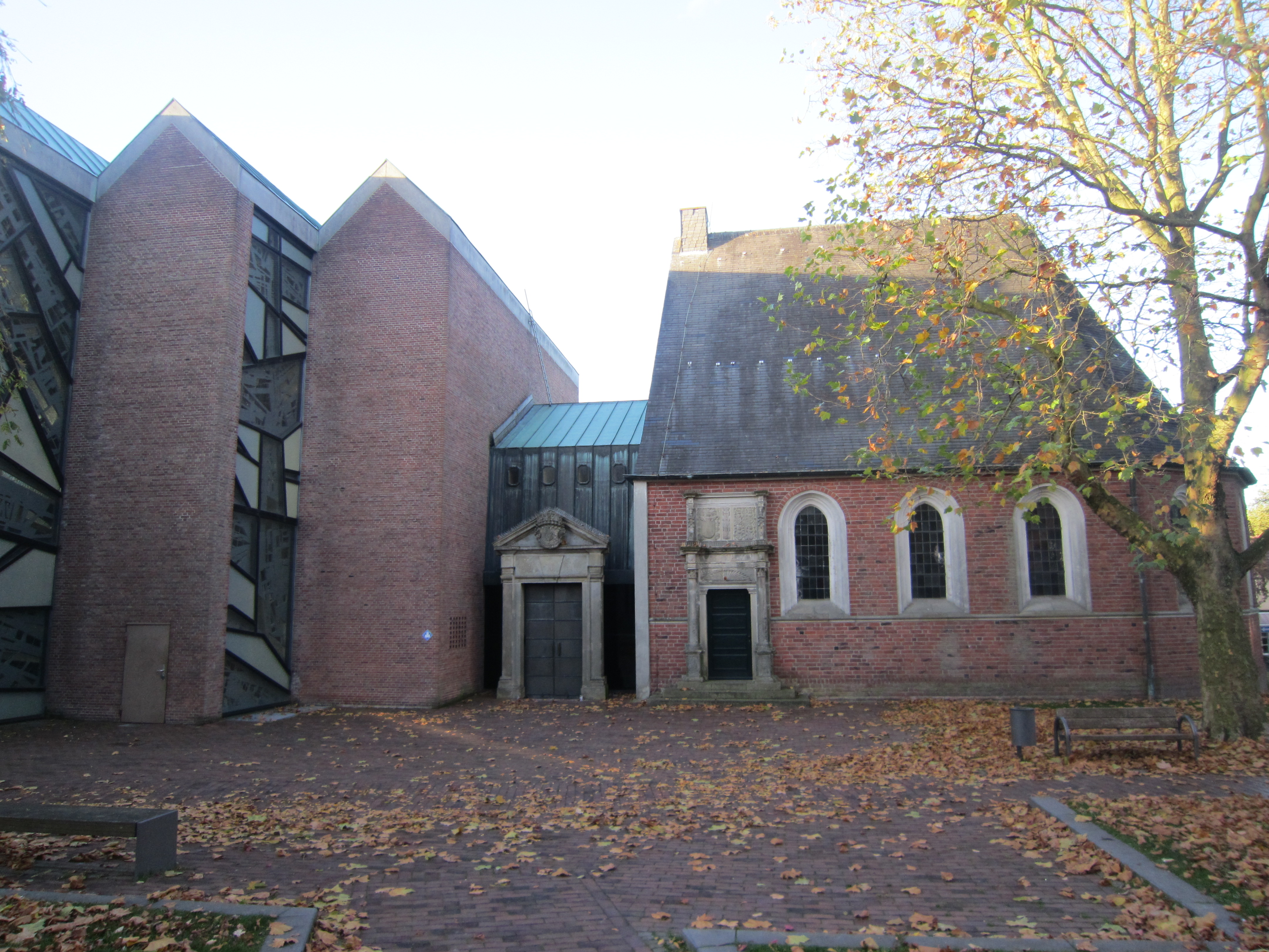 Jever